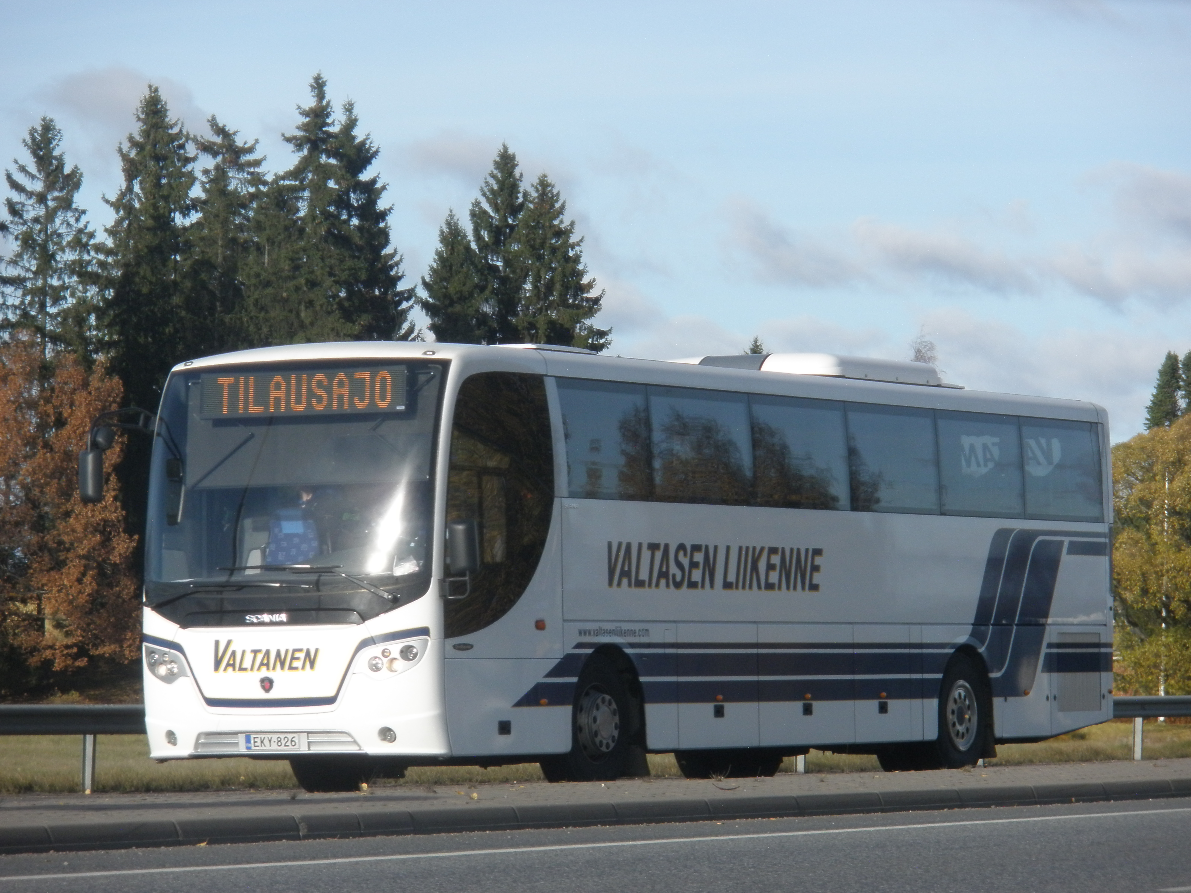 Valtasen Liikenteen Scania OmniExpress kuvattuna Huittisissa 13.10.2013.